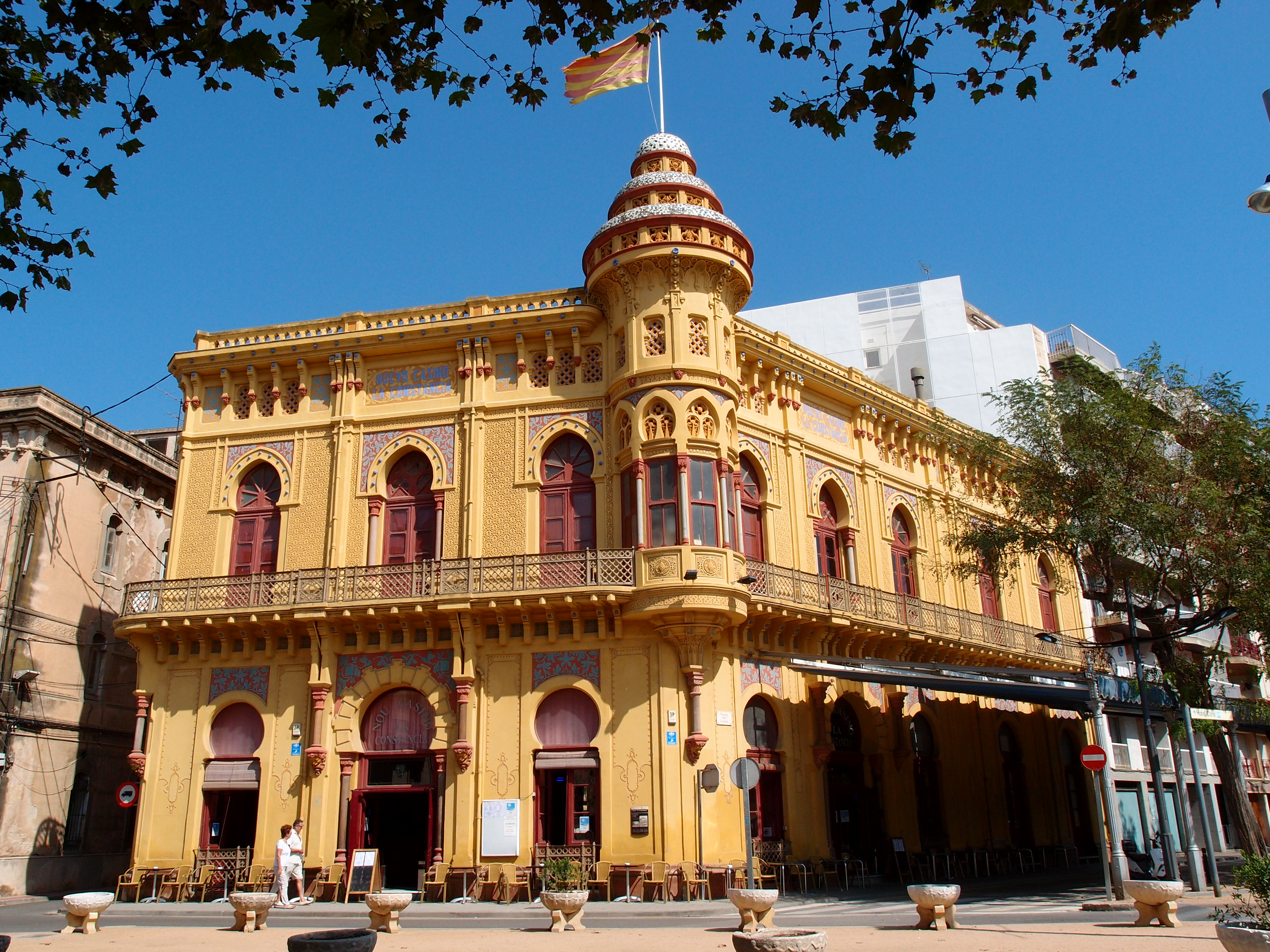 Sant Feliu de Guíxols - Neues Casino Datum: 22.09.2011 Urheber: M. Pfeiffer alias Benutzer:Gordito1869 Quelle: privates Fotoarchiv des Urhebers